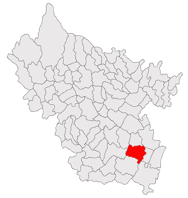 Categorie:Hărţi ale judeţului Buzău